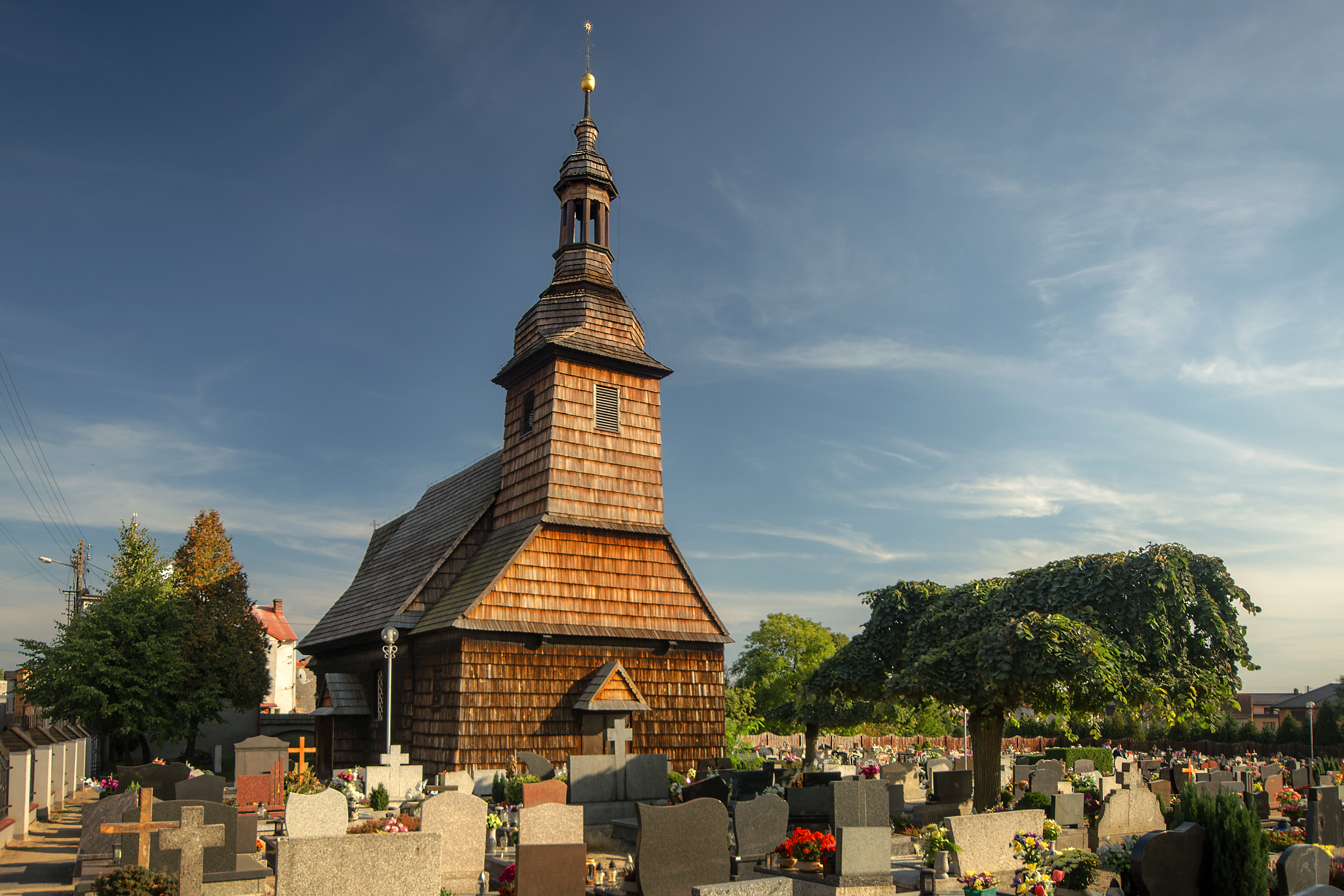 Dobrodzień, kościół cmentarny p.w. św. Walentego, 2 poł. XVII